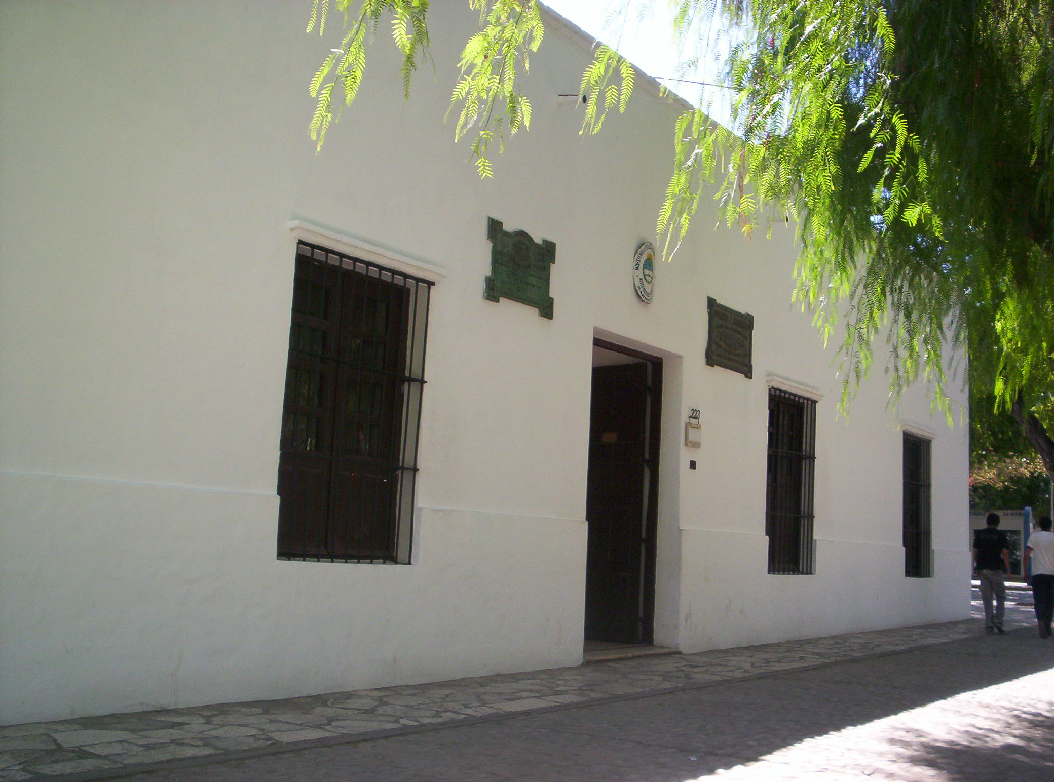 Fotografía que muestra la casa natal de Domingo Faustino Sarmiento, ubicada en la ciudad argentina de San Juan